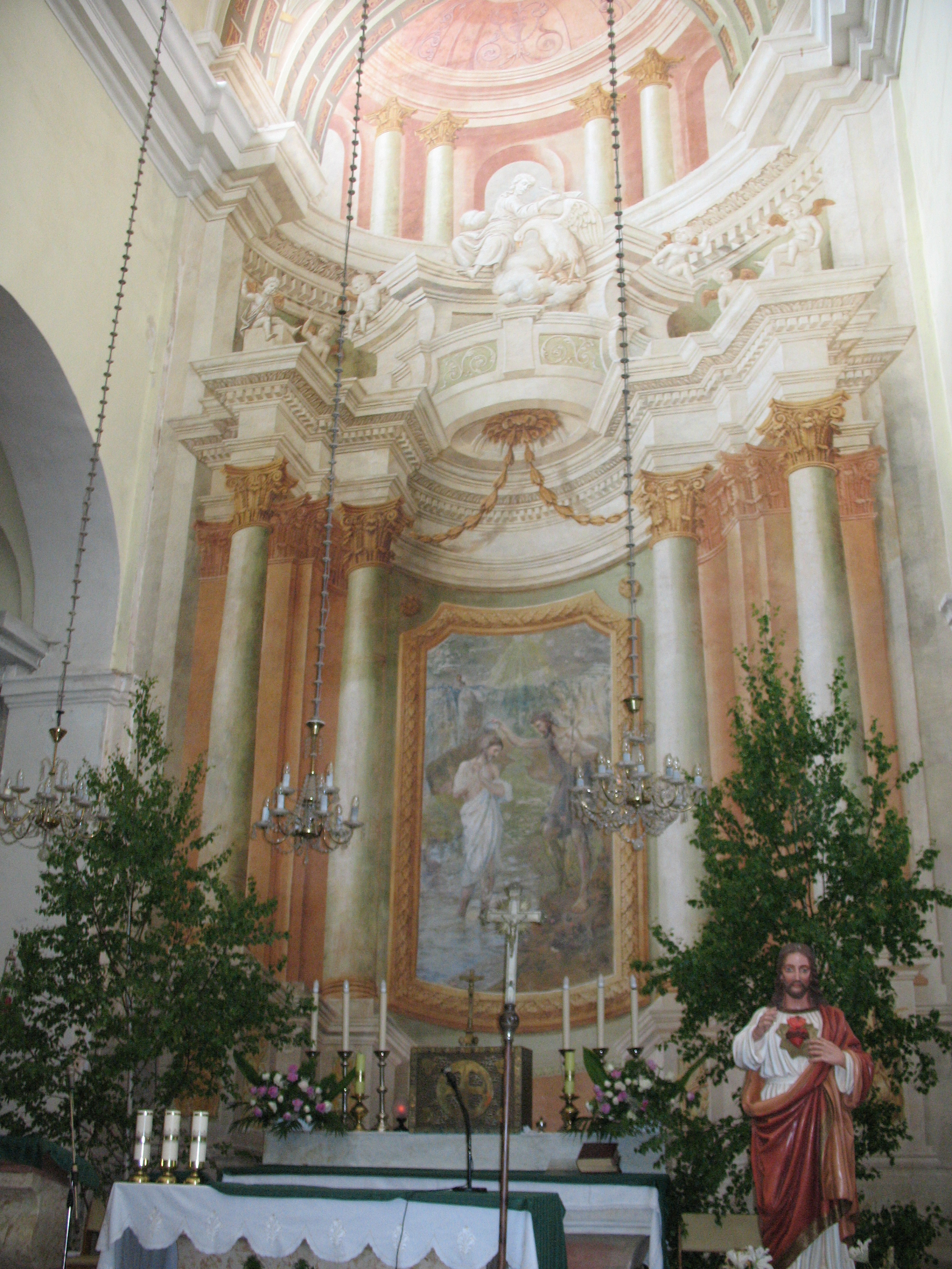 Беларуская (тарашкевіца): Ансамбль кляштара францысканцаў: касьцёл Яна Хрысьціцеля росьпіс алтарнай сьцяны касьцёла жылы корпус агароджа з брамай-званіцай. в. Гальшаны This is a photo of Belarusian heritage monument. Reference number: 412Г000063 ( WLM)